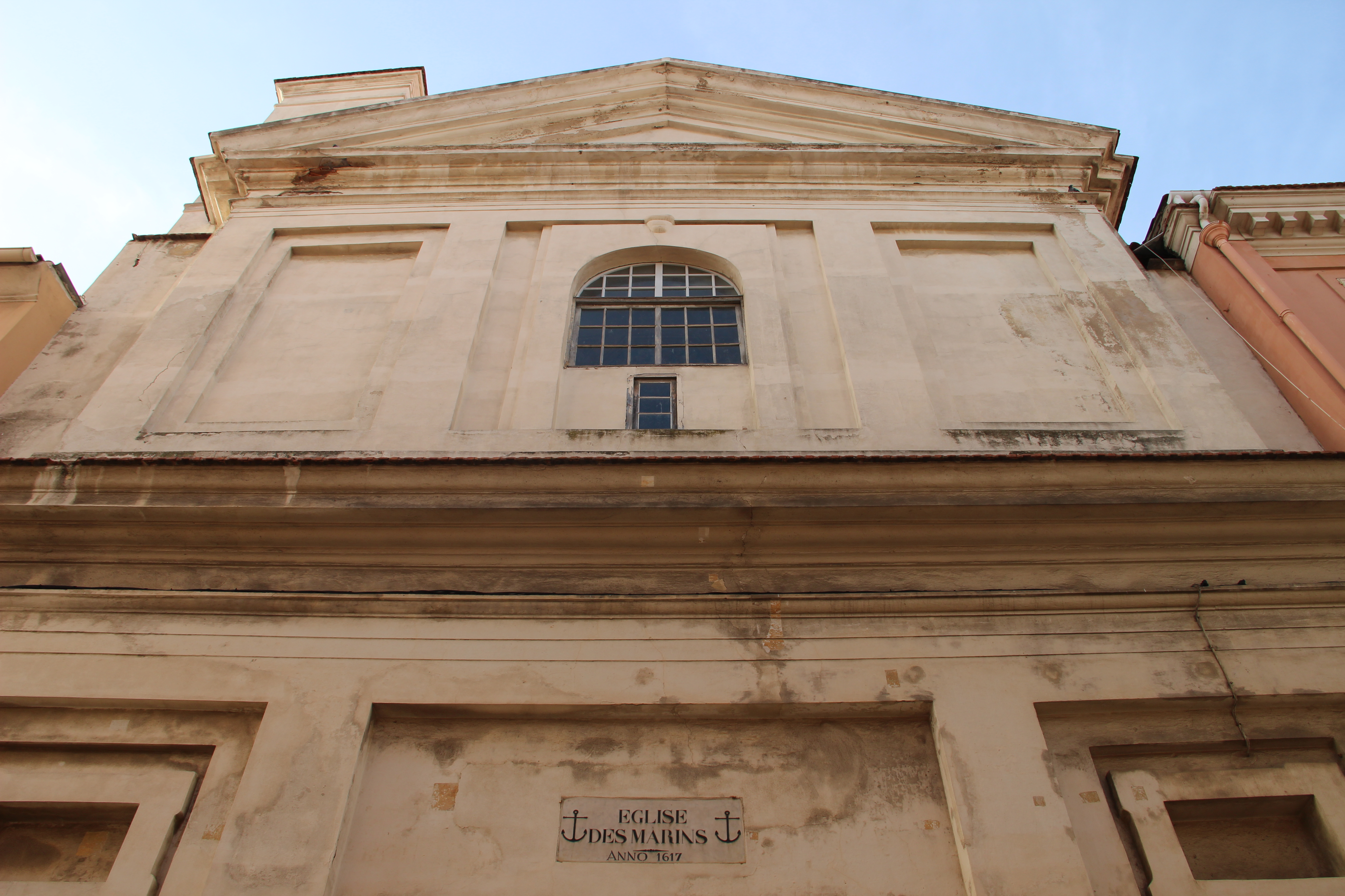 Église des Marins